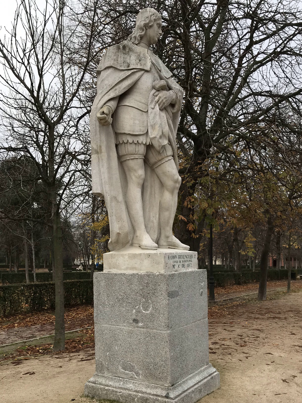 Raimund Berengar IV. Graf von Barcelona, Statue im Retiro-Park in Madrid.